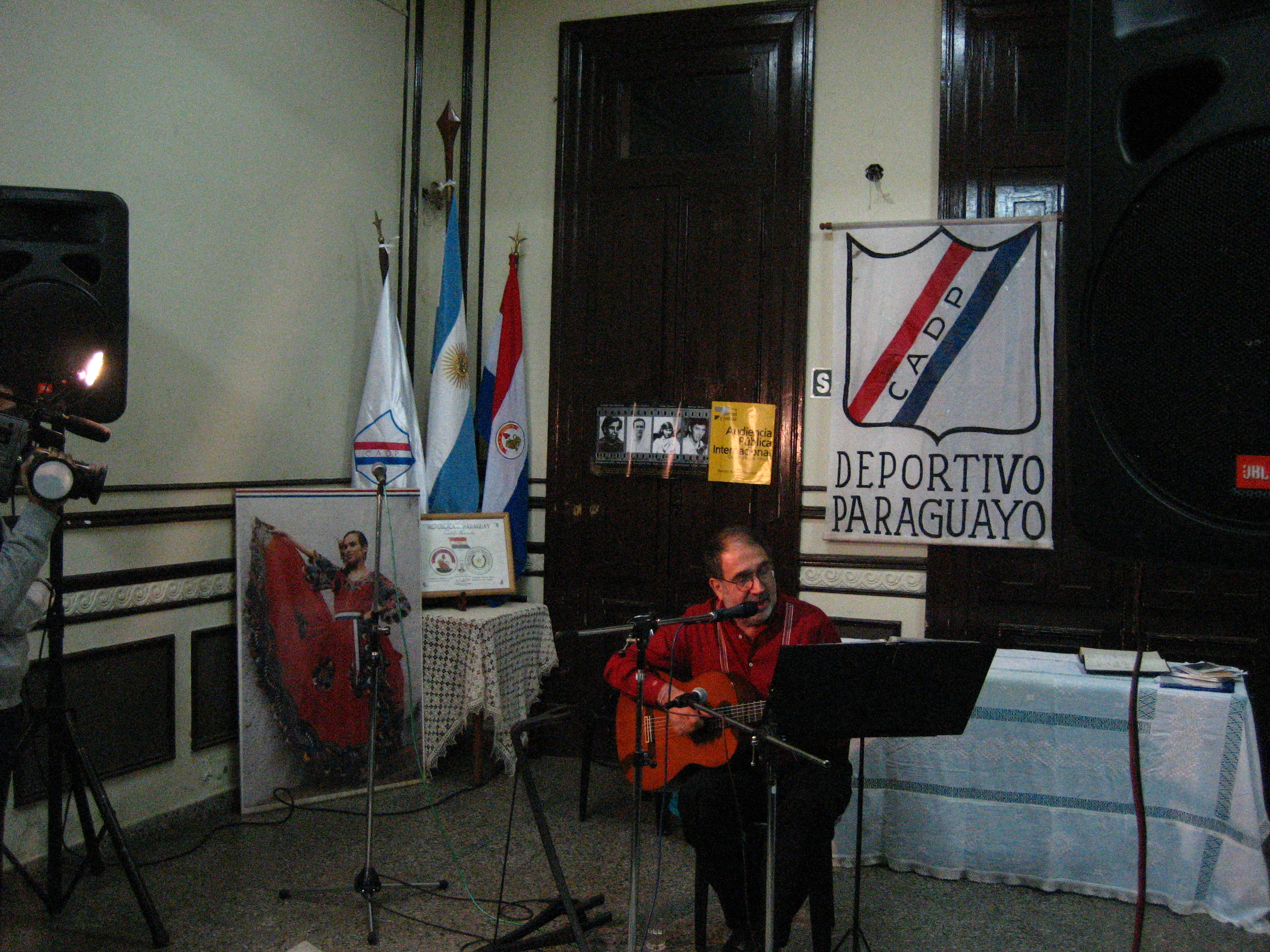 "Encuentro con La Memoria" -- Homenaje y Gratitud a Elvio Romero At the Club Atletico Deportivo Paraguayo (Deporte, cultura y solidaridad), Ciudad Autónoma de Buenos Aires